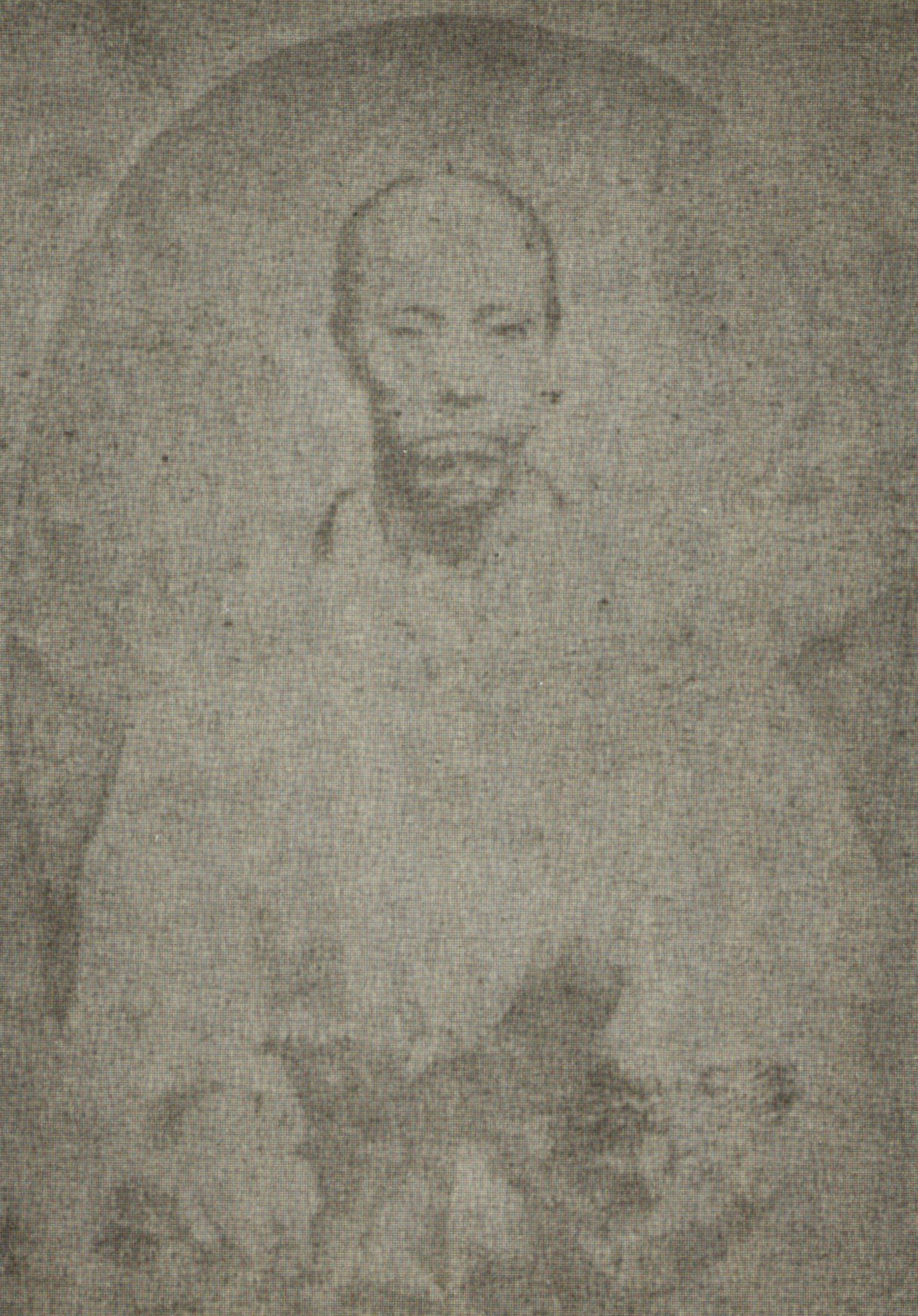 水野忠誠の肖像写真。